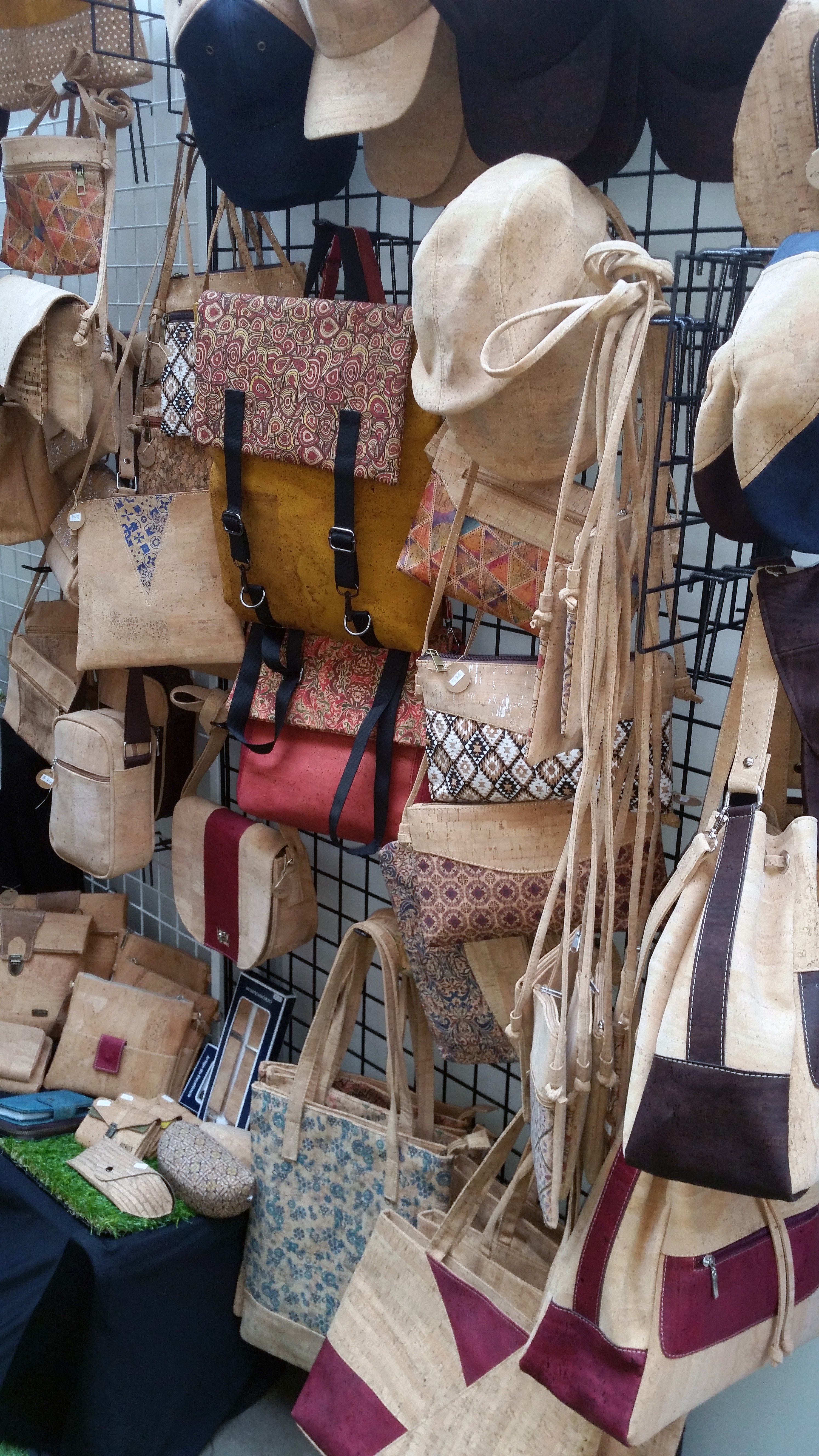 Objets en liège sur un stand du VeggieWorld Paris en octobre 2019